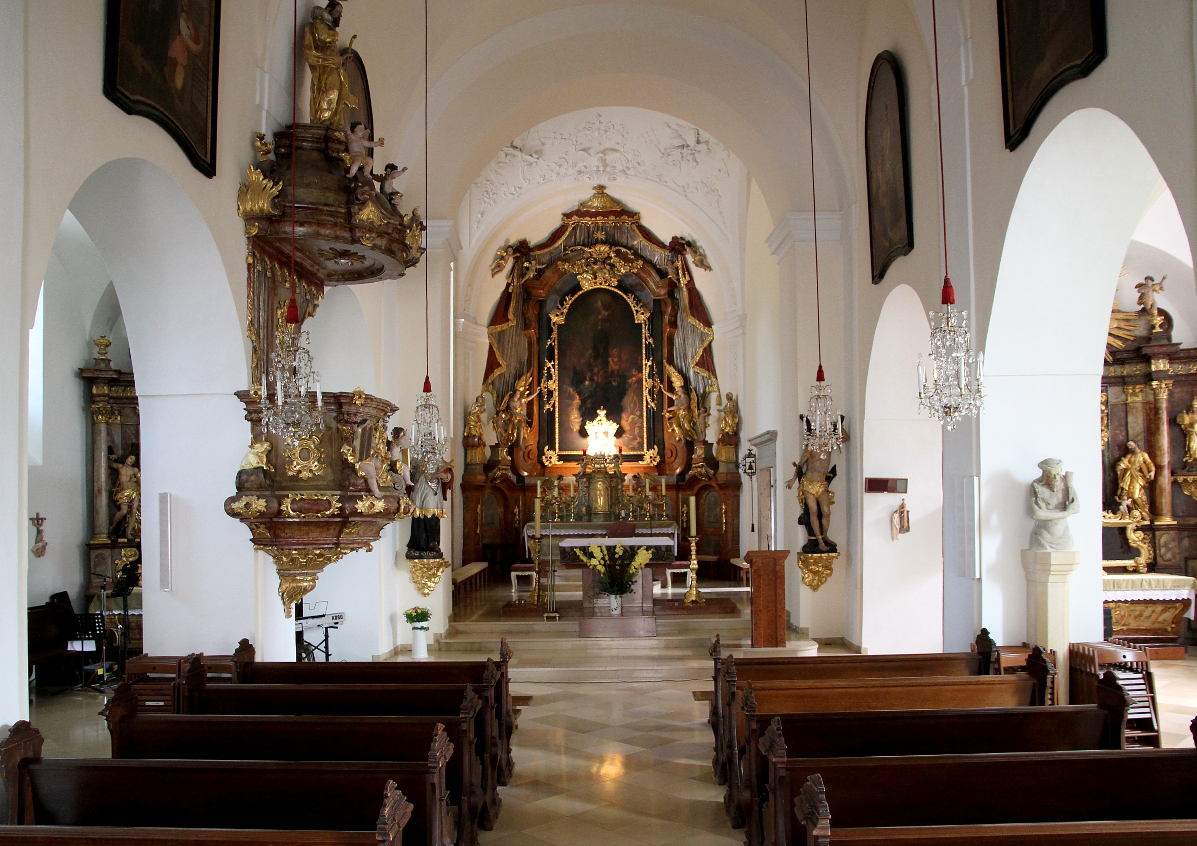 Die Innenansicht der kath. Pfarrkirche hl. Katharina in der niederösterreichischen Marktgemeinde Langenzersdorf.